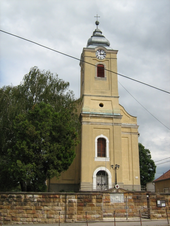 Balassagyarmat, evangélikus templom